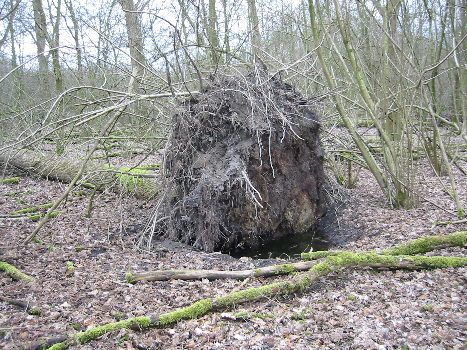 Populier in het Hulkesteinse bos, Flevoland. Vooral het verschil in droog bovenin en nat in de kuil is interessant.